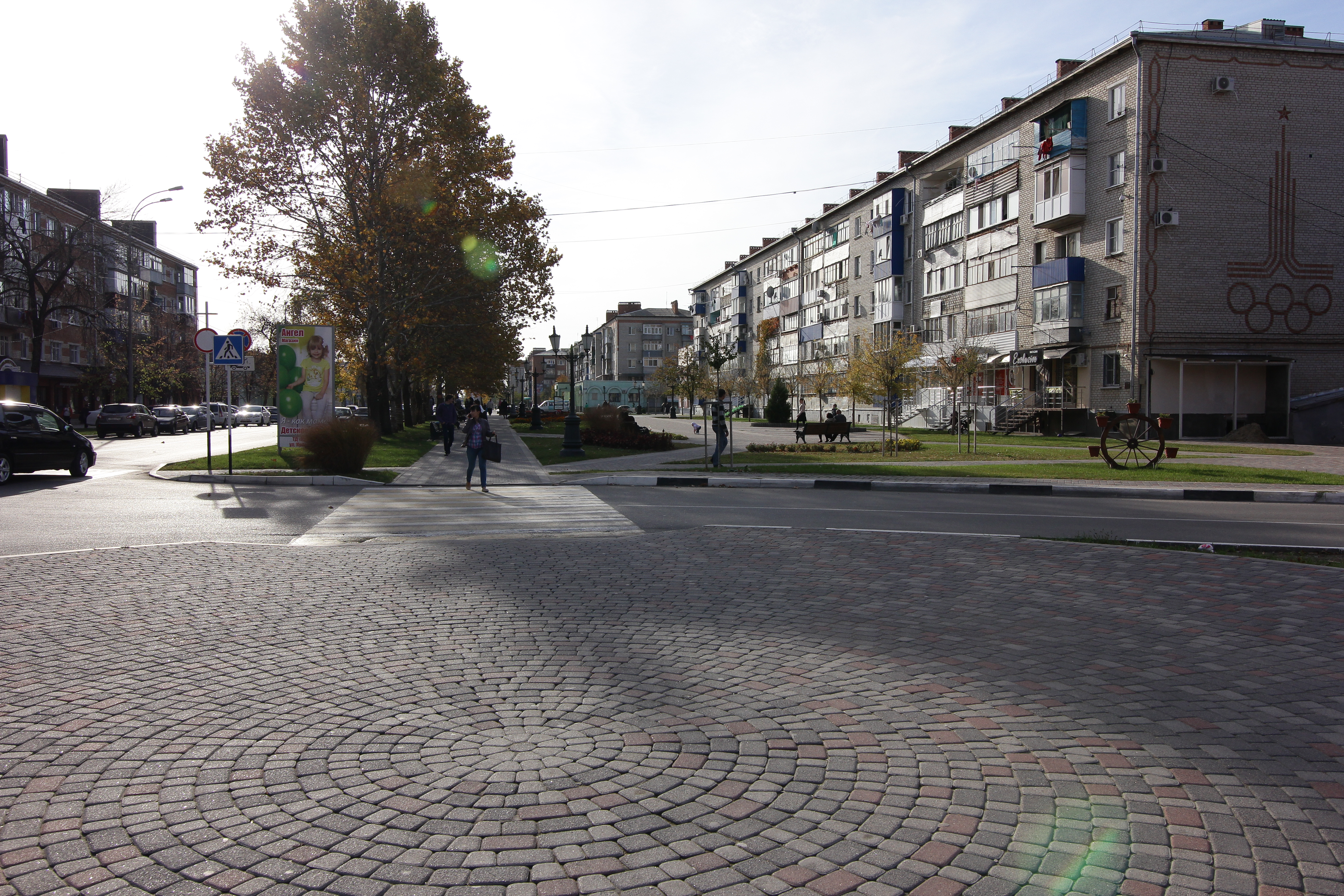 Город Славянск-на-Кубани: Славянский район, Краснодарский край This image is related to the protected area of Russia number 2320303